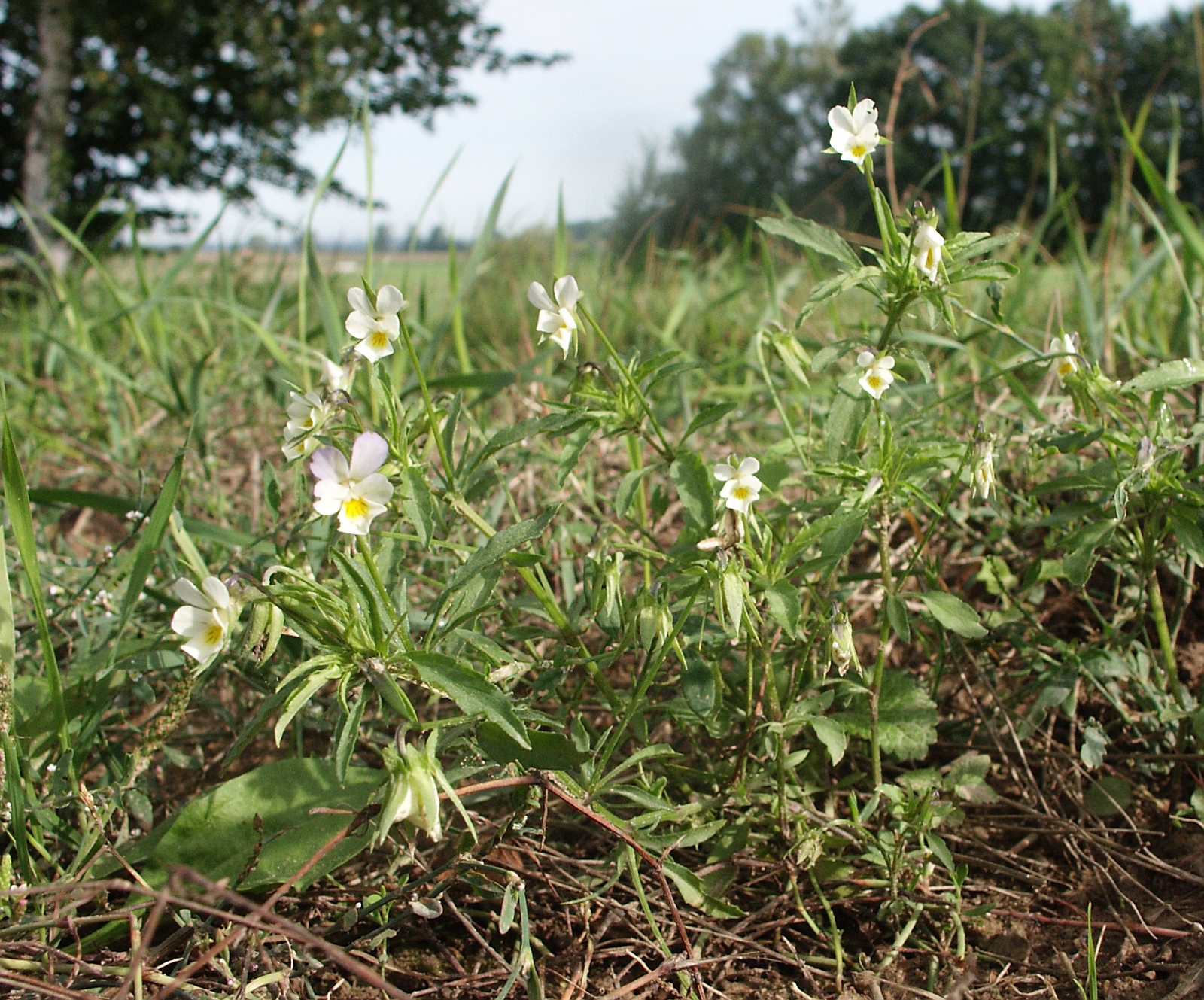 Viola arvensis, Frankenhöhe, Germany